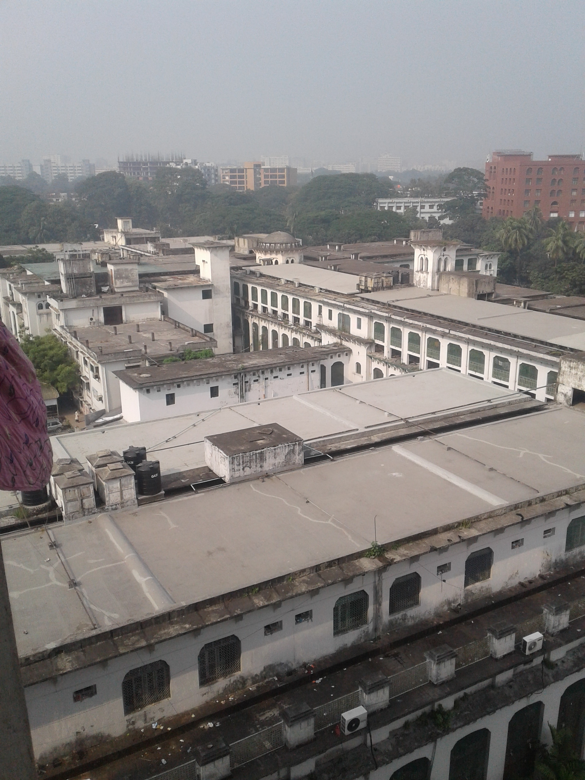 হাসপাতালের একাংশ-২